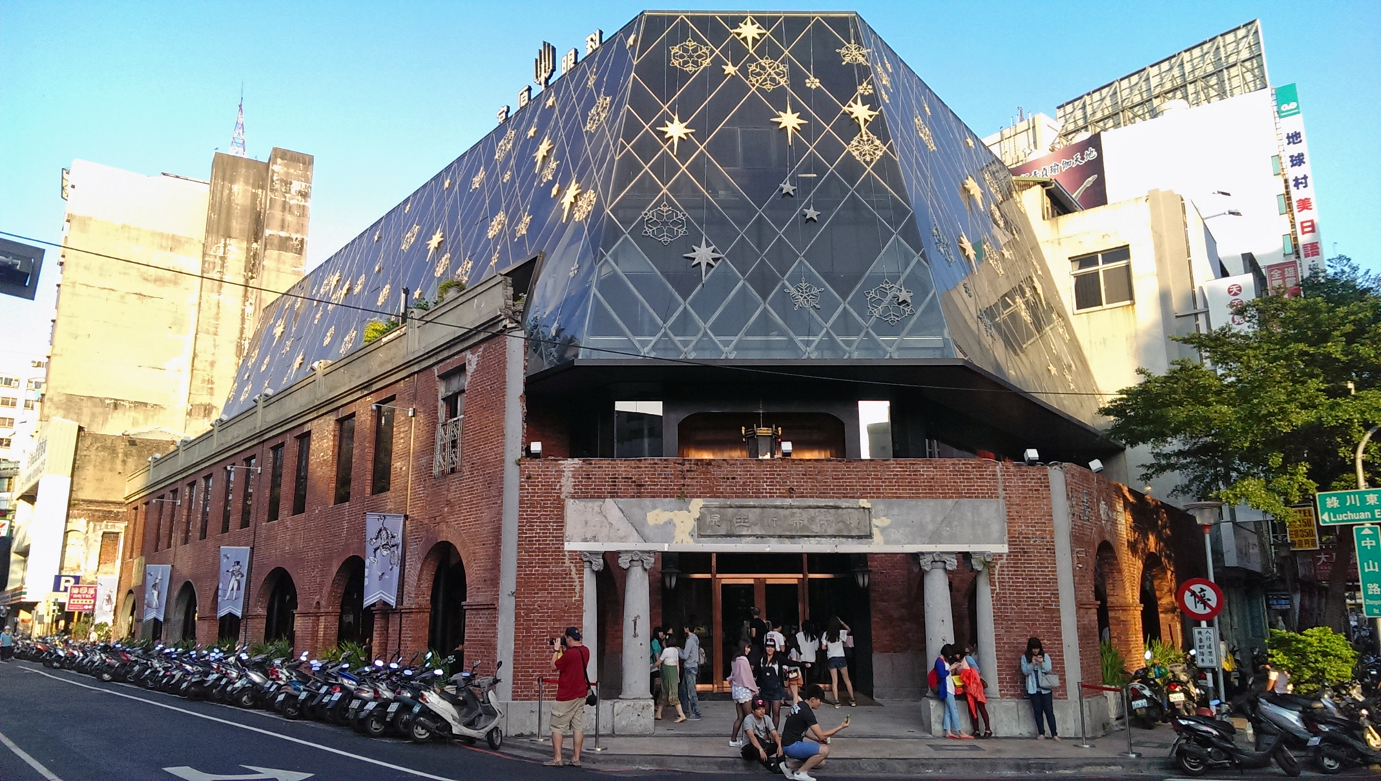 中文（台灣）: 日出宮原眼科門市